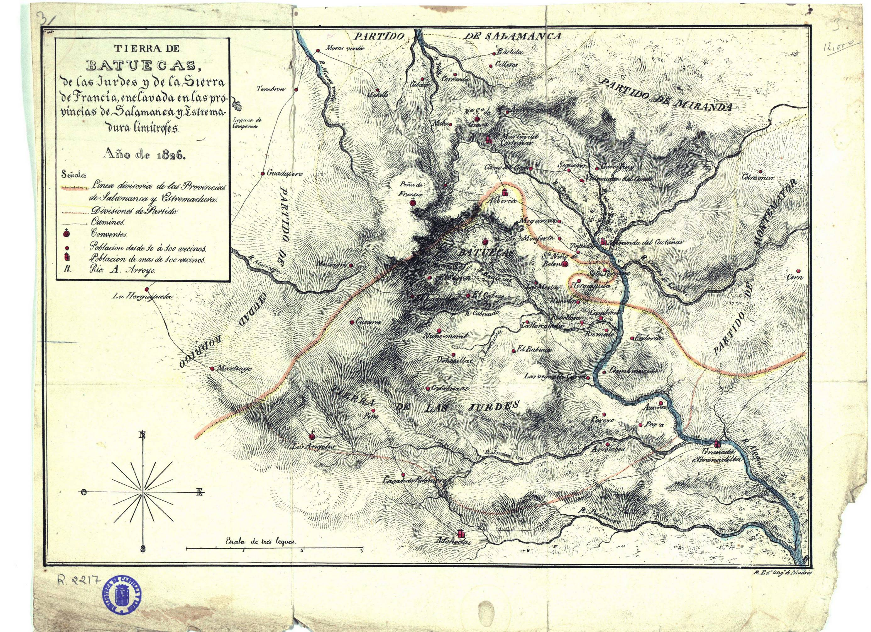 Tierra de Batuecas, de las Jurdes y de la Sierra de Francia, enclavada en las provincias de Salamanca y Estremadura limítrofes [Material cartográfico]: [mapa general].